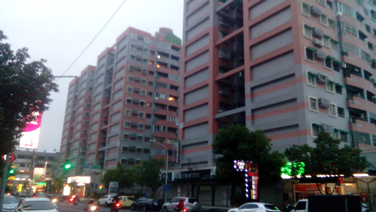 鹽水區台灣詩路剪影